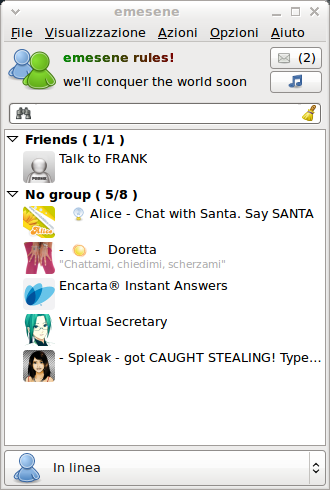 Captura de pantalla del emesene